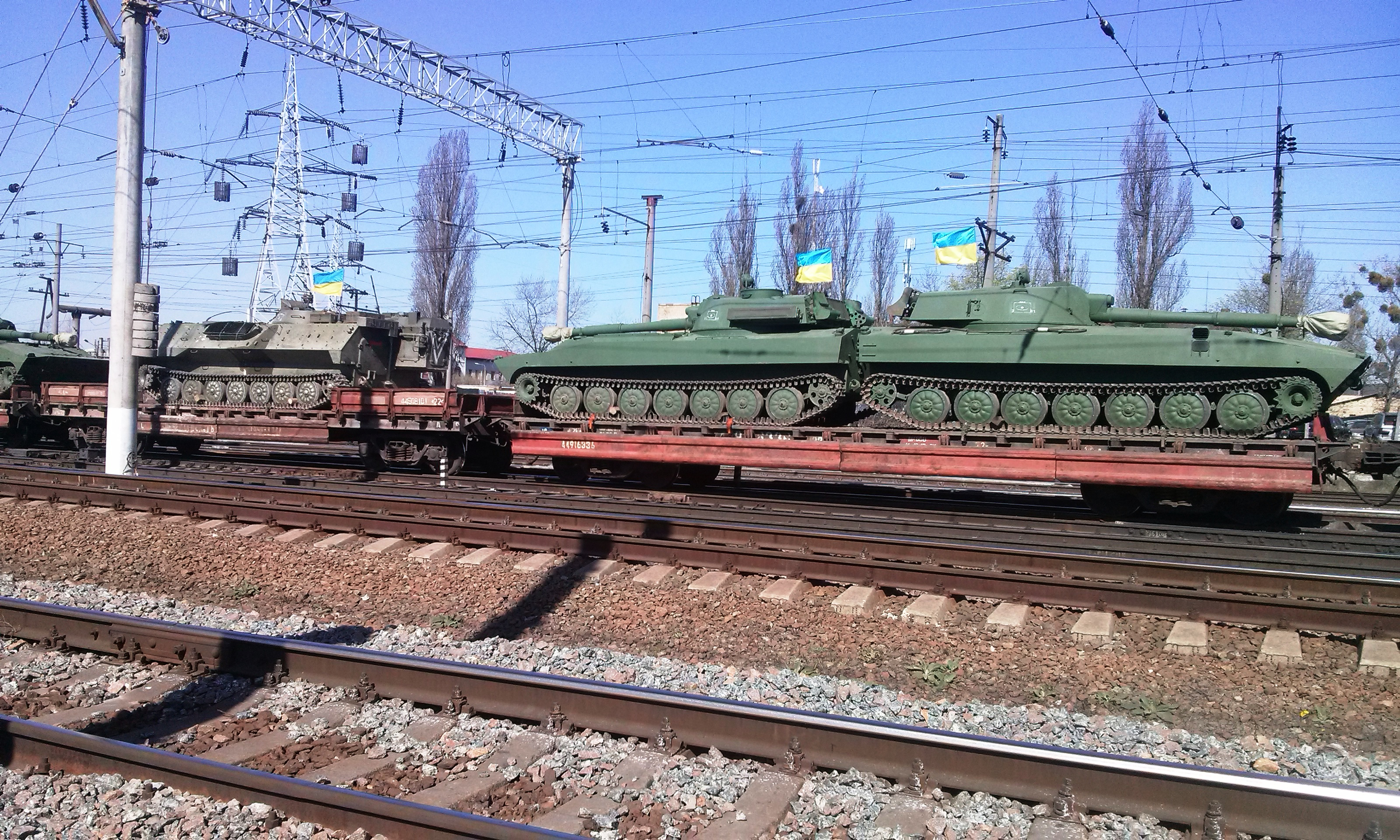 2С1 Вооруженных сил Украины на железнодорожной платформе воинского поезда